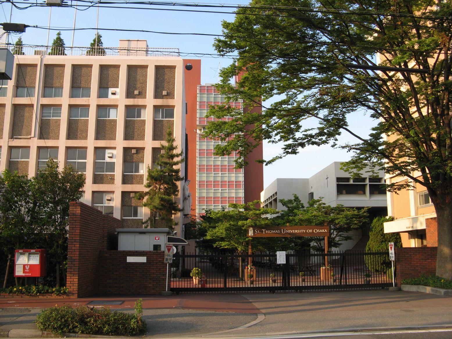 聖トマス大学 2007年6月15日 Bakkai撮影